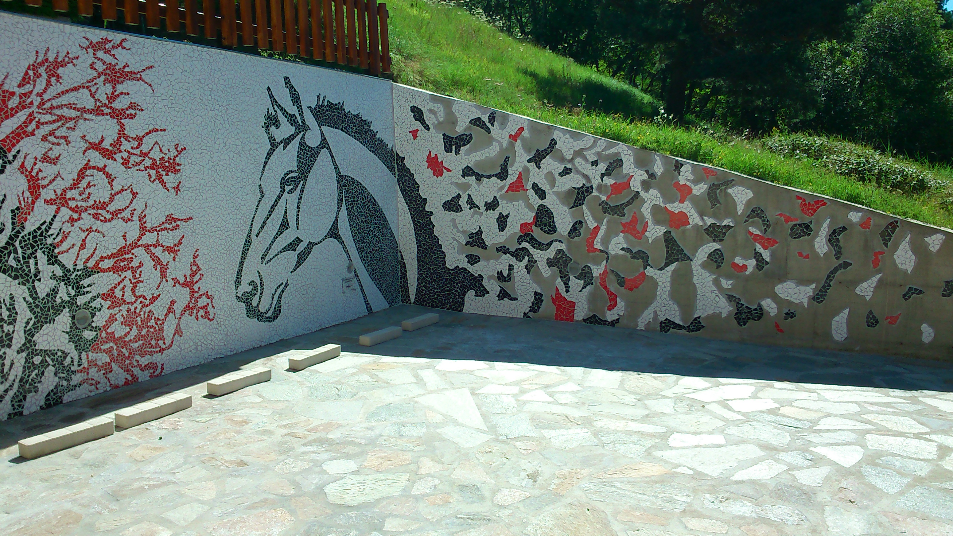 Mosaïque réalisée par l'artiste plasticien Henrijean, Puy-de-Dôme, France.